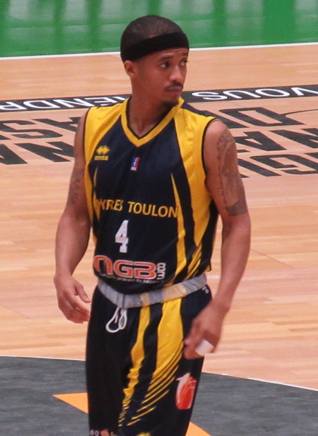 Maurice Acker avec Hyères-Toulon